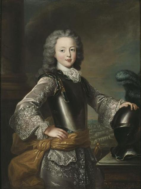 Portrait of François Étienne of Lorraine (1708-1765)